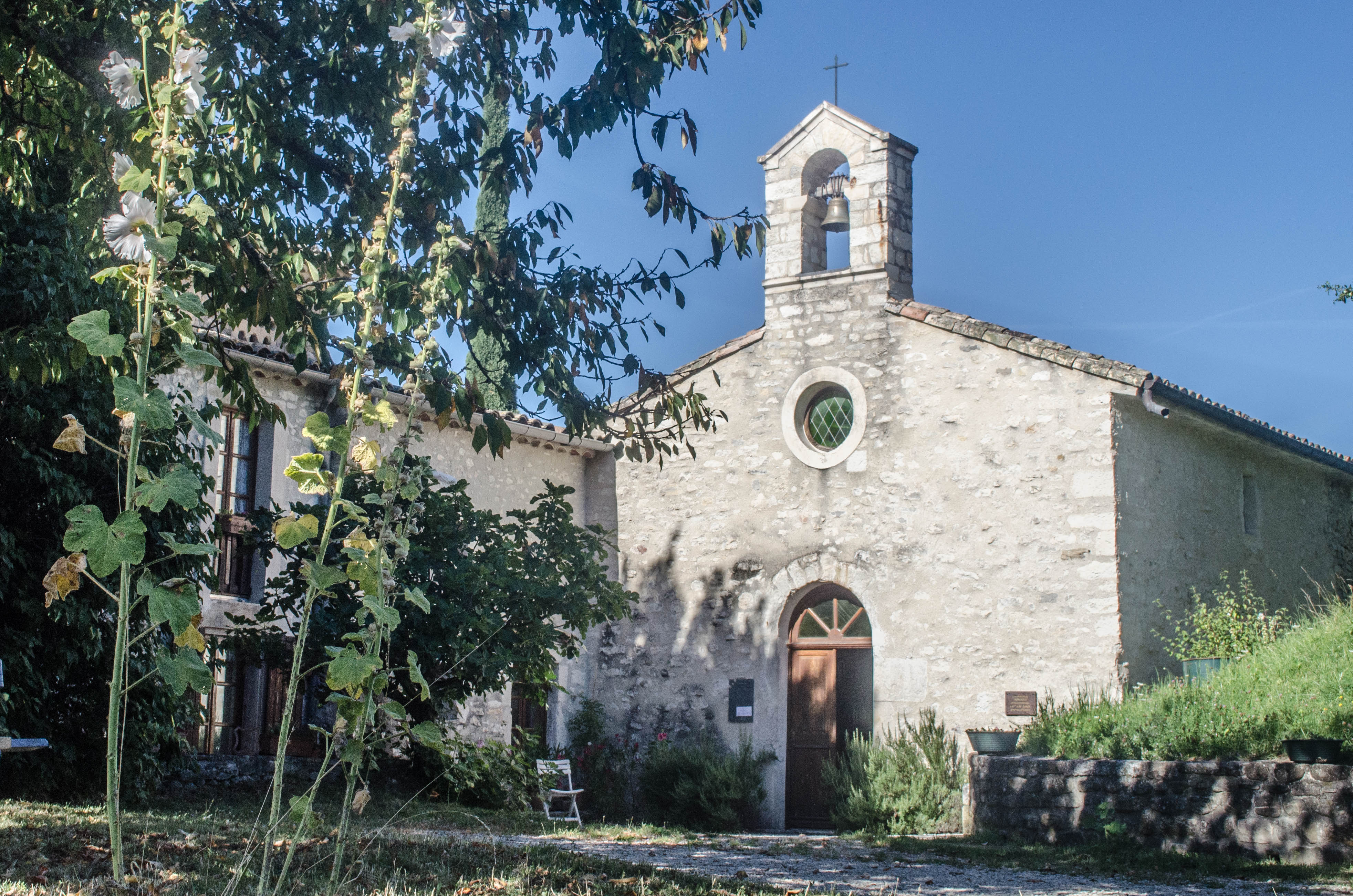 Montjoux, Drôme, Auvergne Rhône-Alpes, France : église Saint-Étienne.